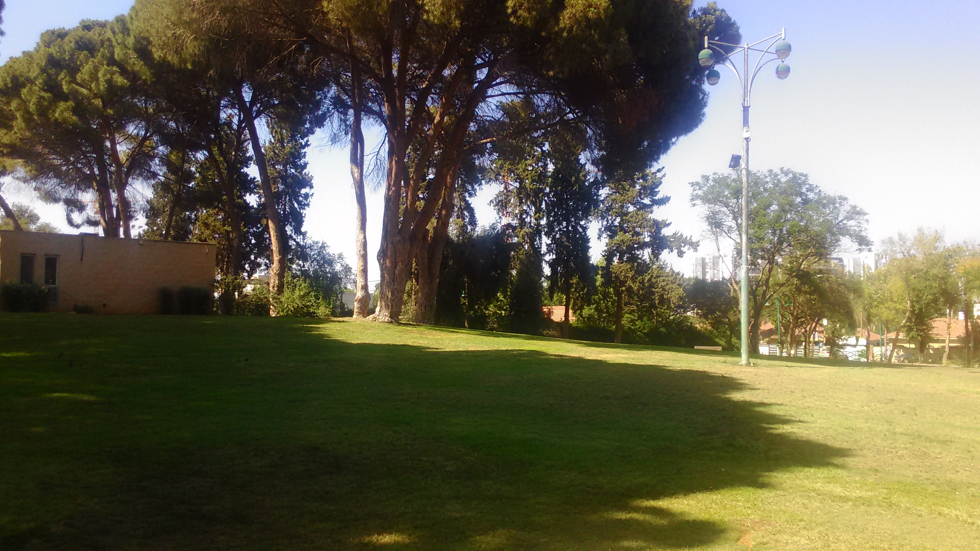 גן קפלן, 2017